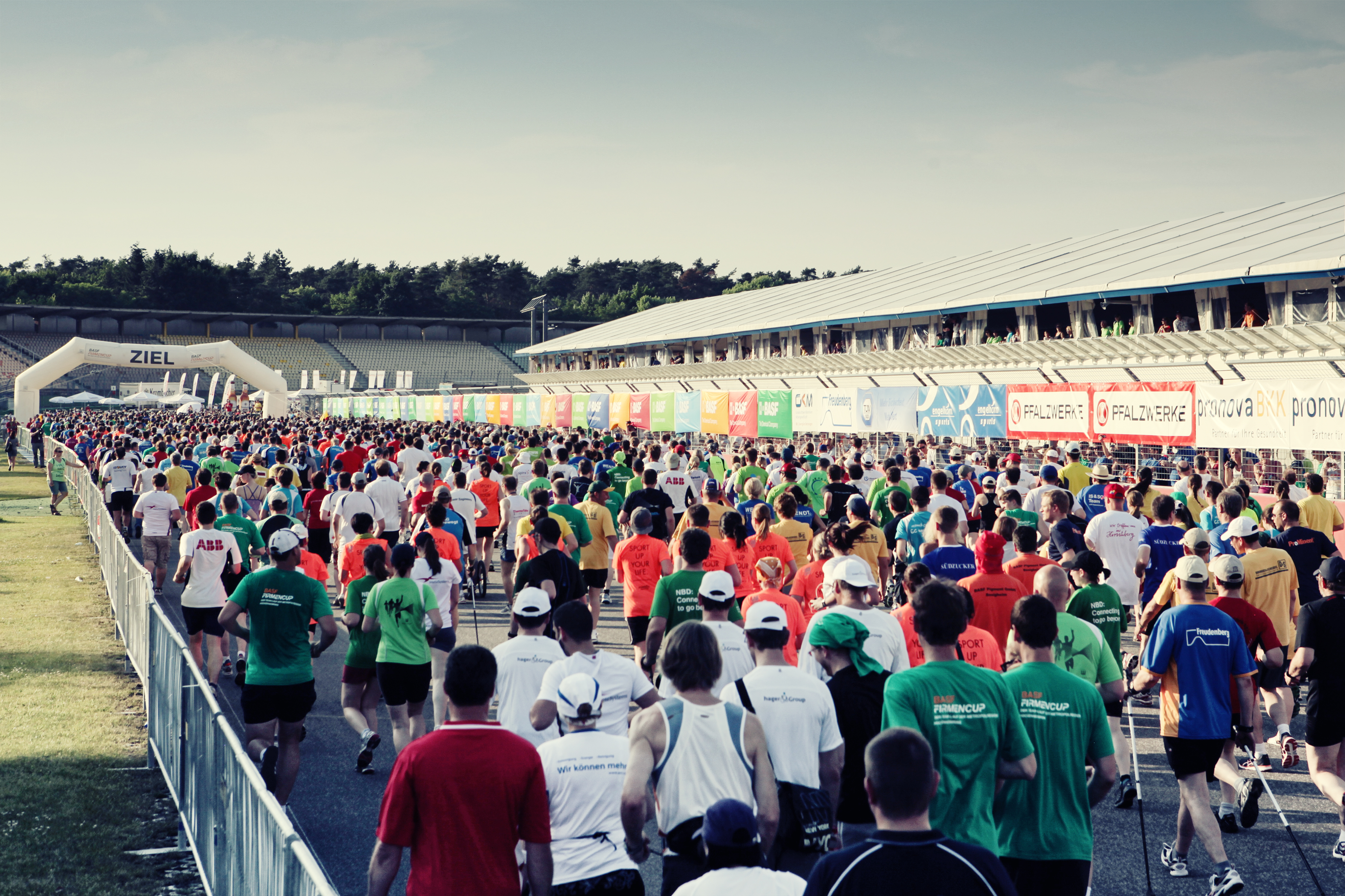 Firmencup-Zieleinlauf auf dem Hockenheimring 2013